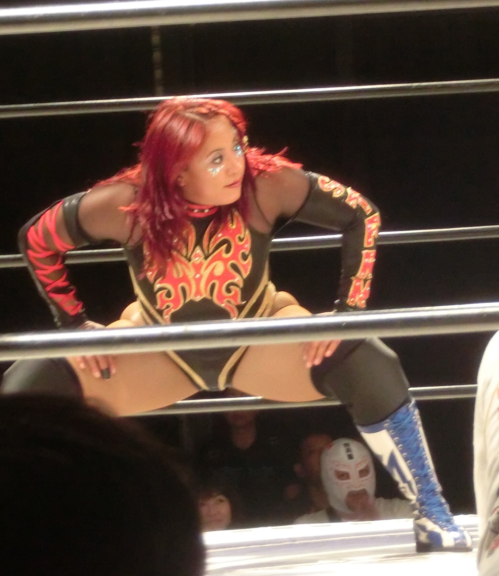 新木場・覆面MANIA MARSELA